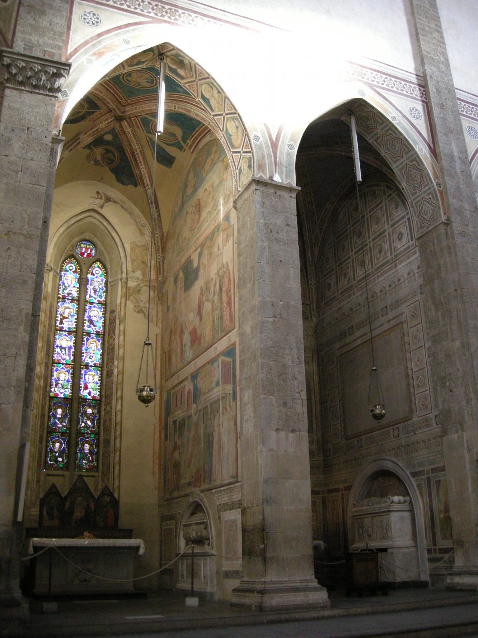 Cappelle peruzzi e giusti